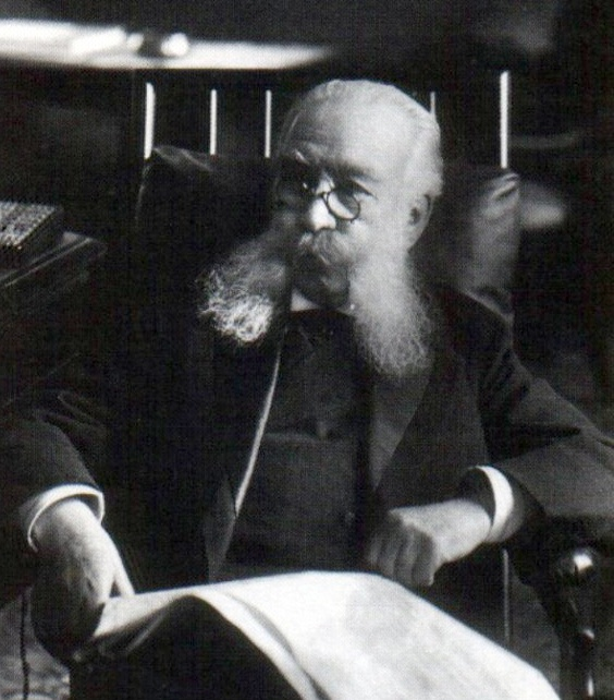 Председатель Совета министров И.Л.Горемыкин